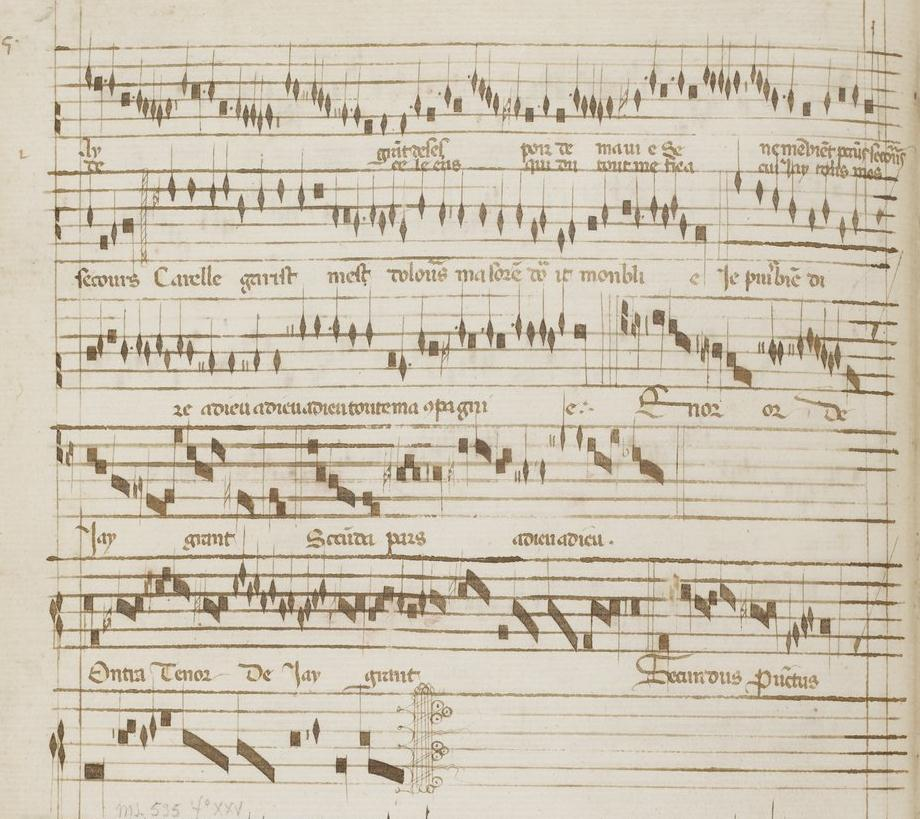 Codex Reina